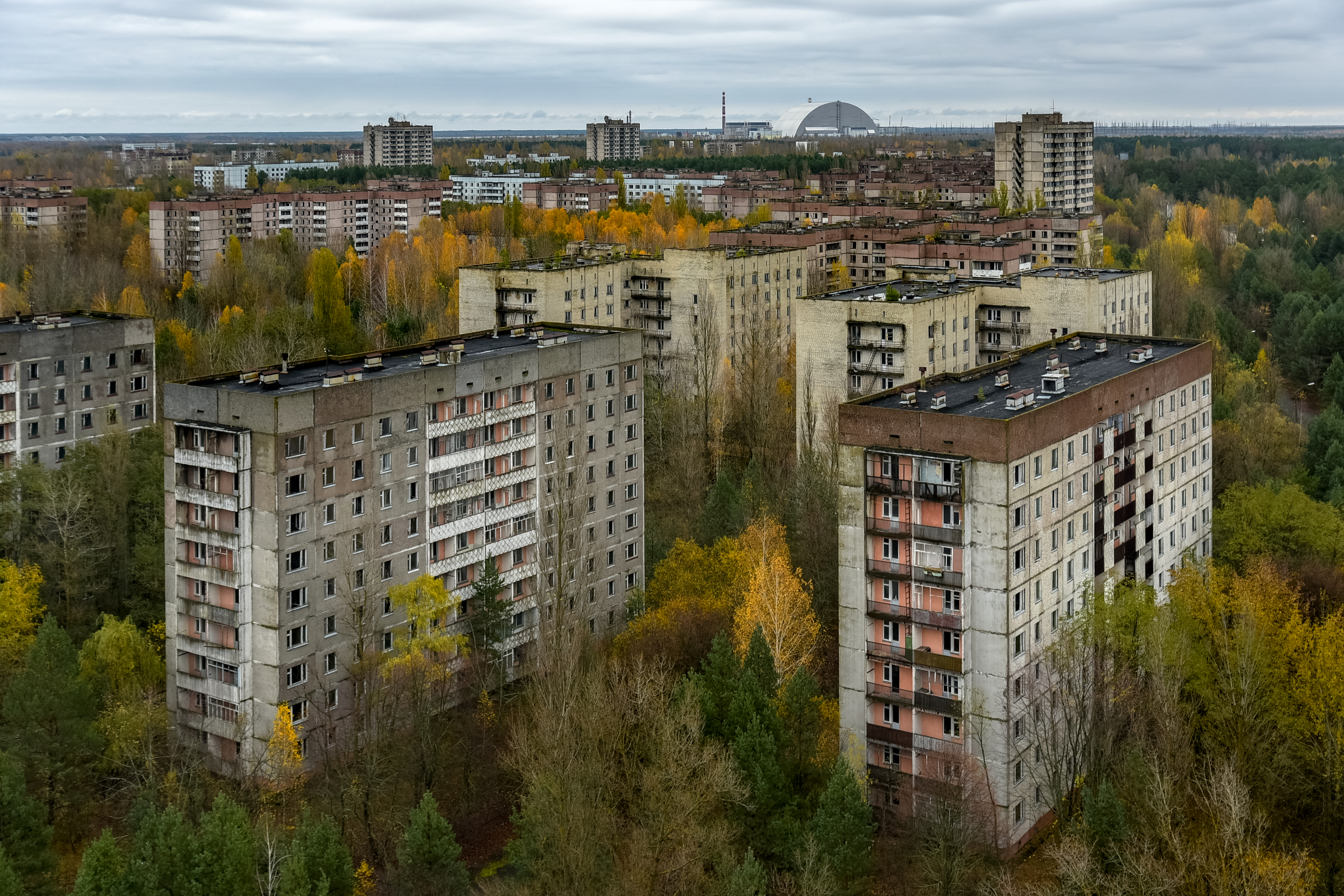 Pripyat (Ukraine)